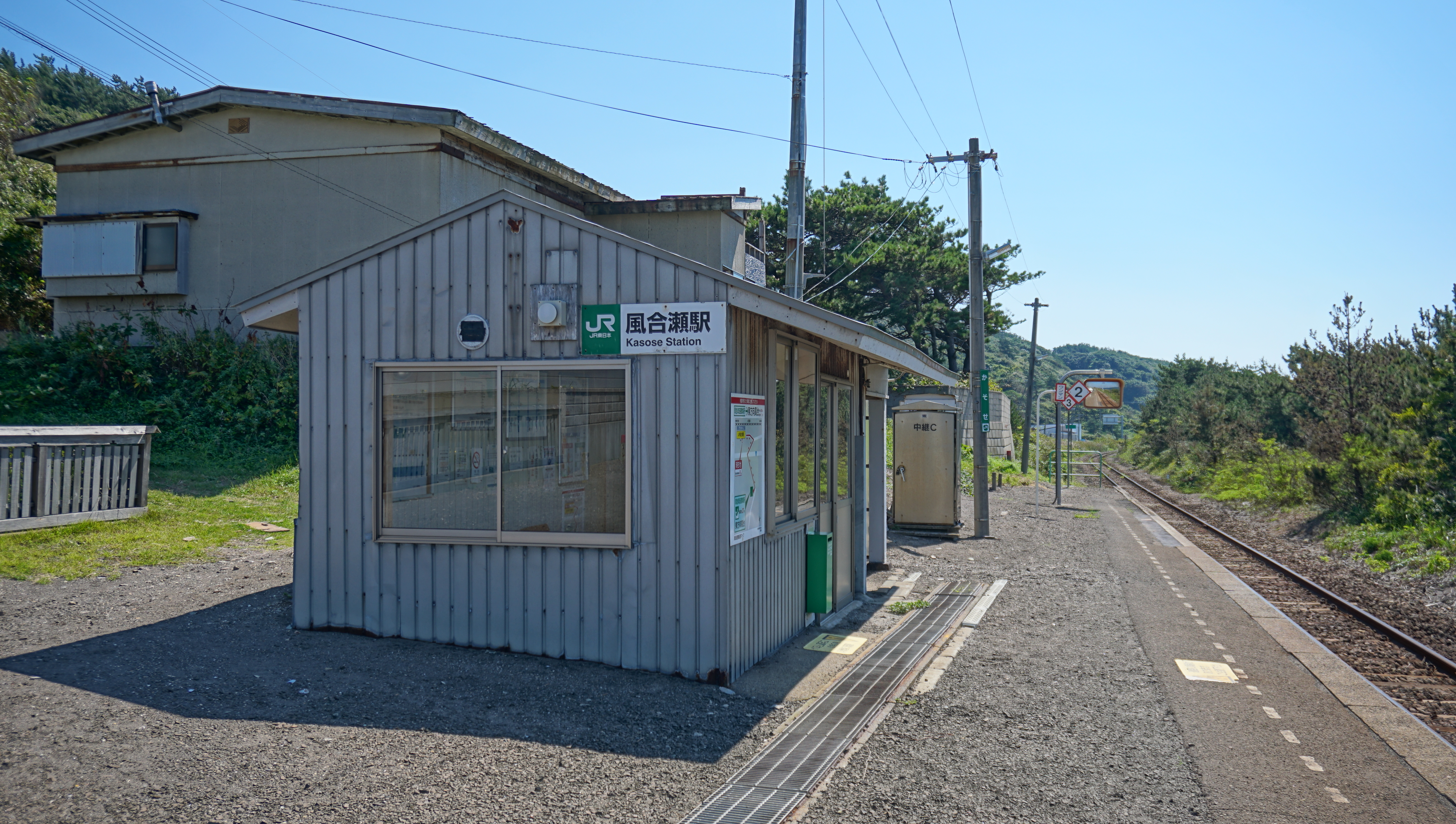 五能線 風合瀬駅（青森県西津軽郡深浦町）